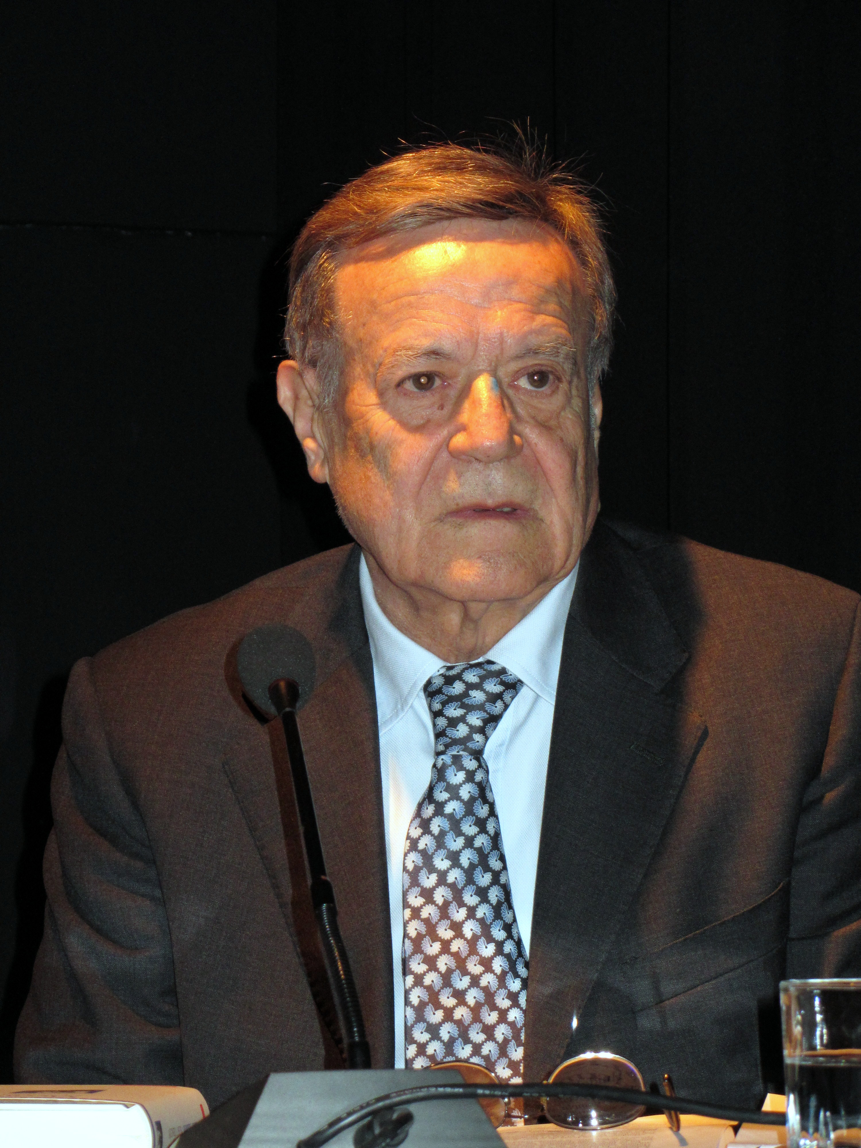 El crítico e investigador literario italiano Gabriele Morelli, Santiago de Chile, 6 de mayo de 2013